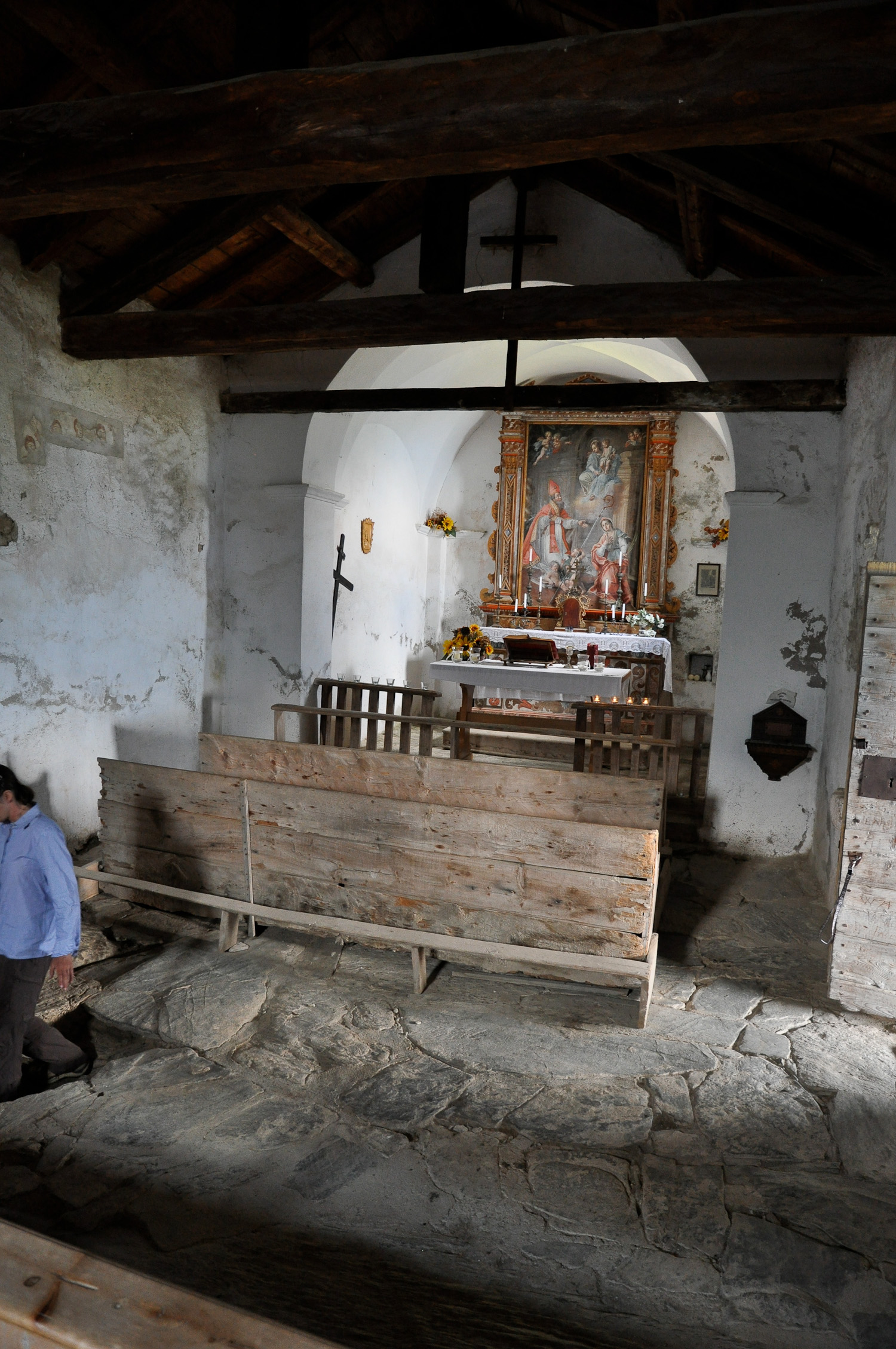 Kirche San Romerio, Brusio Innenraum, Altar